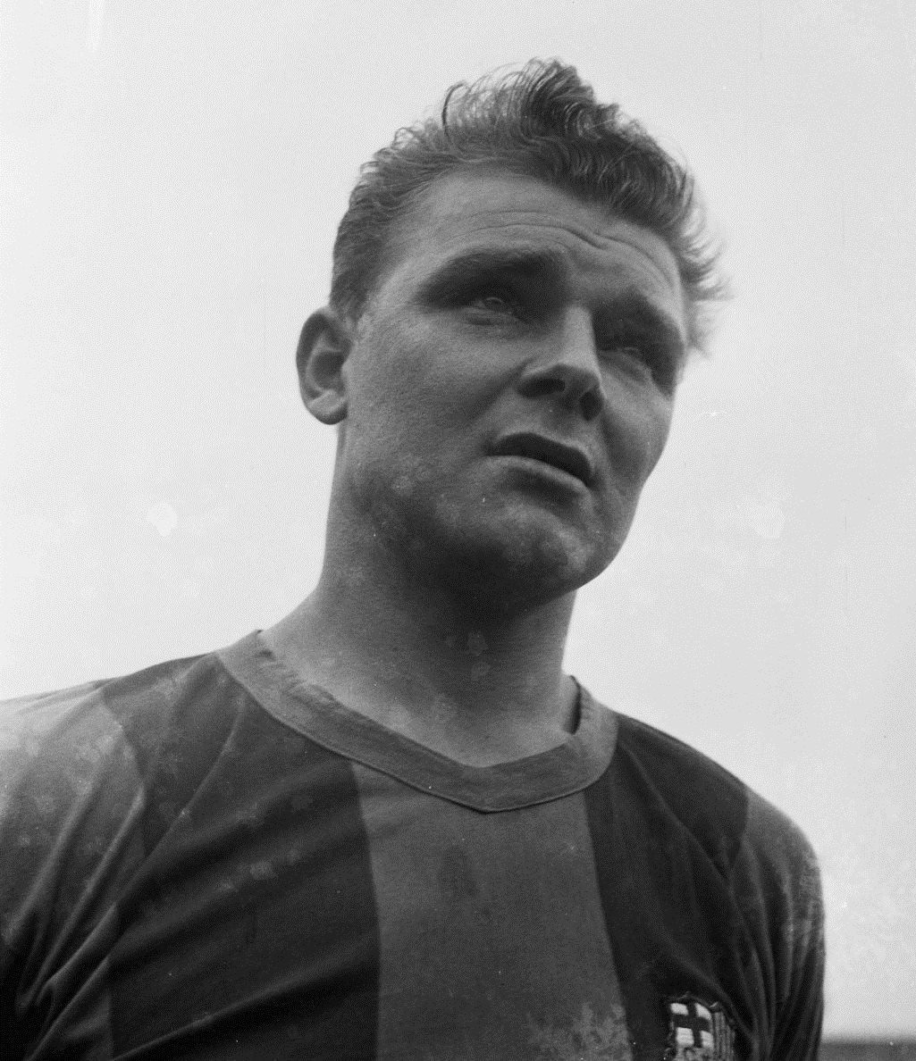 Kubala in het shirt van FC Barcelona tijdens een demonstratiewedstrijd van de FIFA